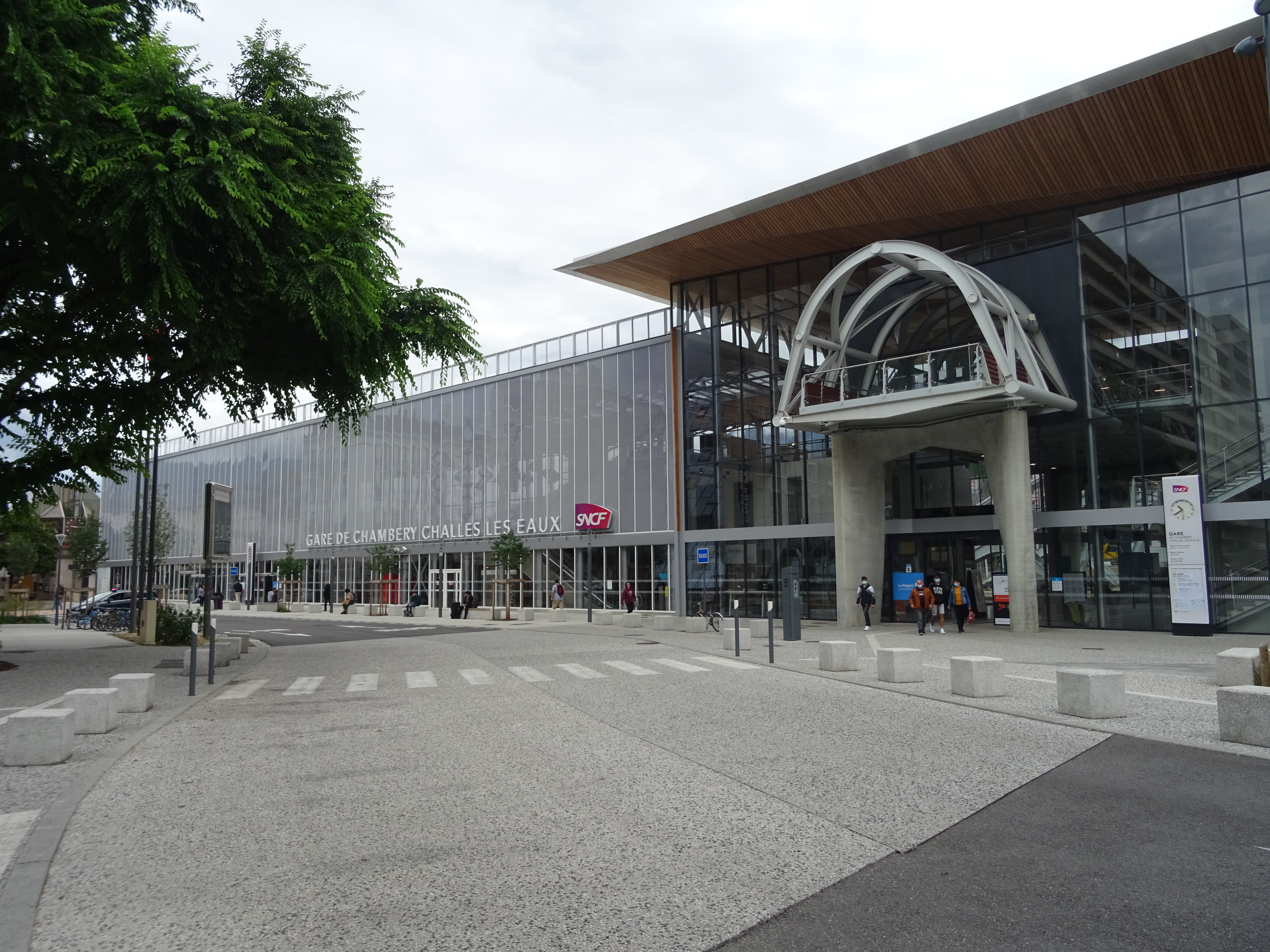 Nouveau bâtiment voyageurs vu depuis l'arrêt des bus de la ville.